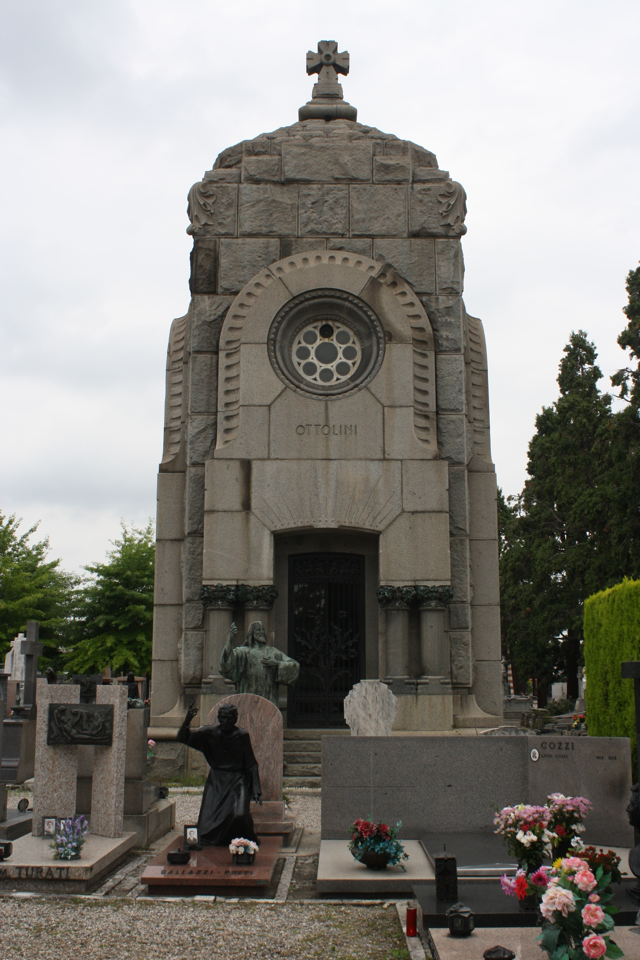 L'edicola Ottolini nel Cimitero Monumentale di Busto Arsizio.